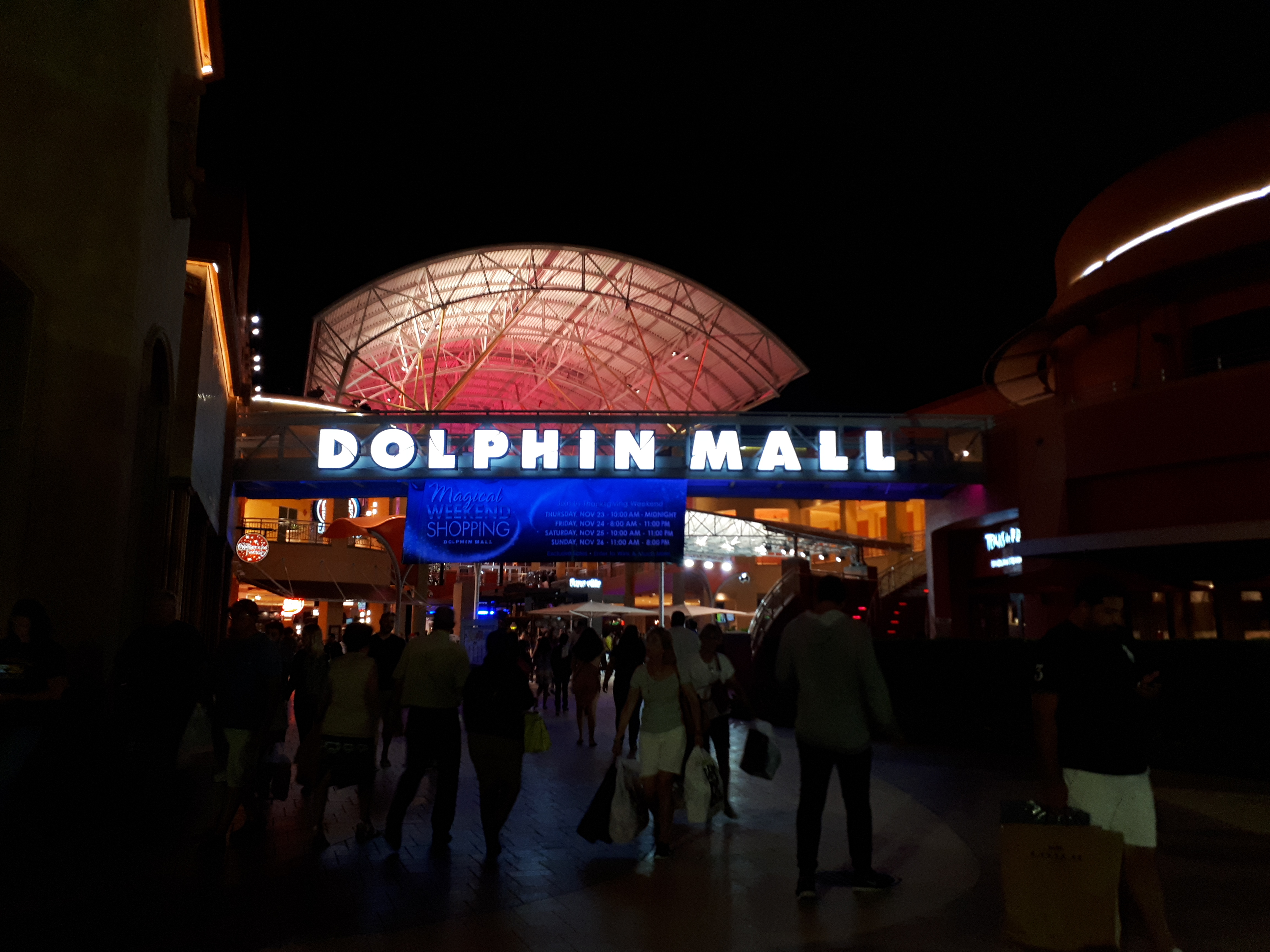 Nachtaufnahme des Ramblas Plaza der Dolphin Mall in Sweetwater, Florida, im November 2017